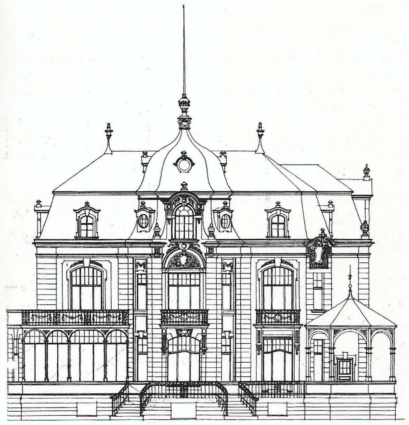 Villa Finkler, Tempelstraße 10, Bonn-Gronau: Zweiter, ausgeführter Entwurf, Zeichnung zum Bauantrag, Aufriss der Rheinfront